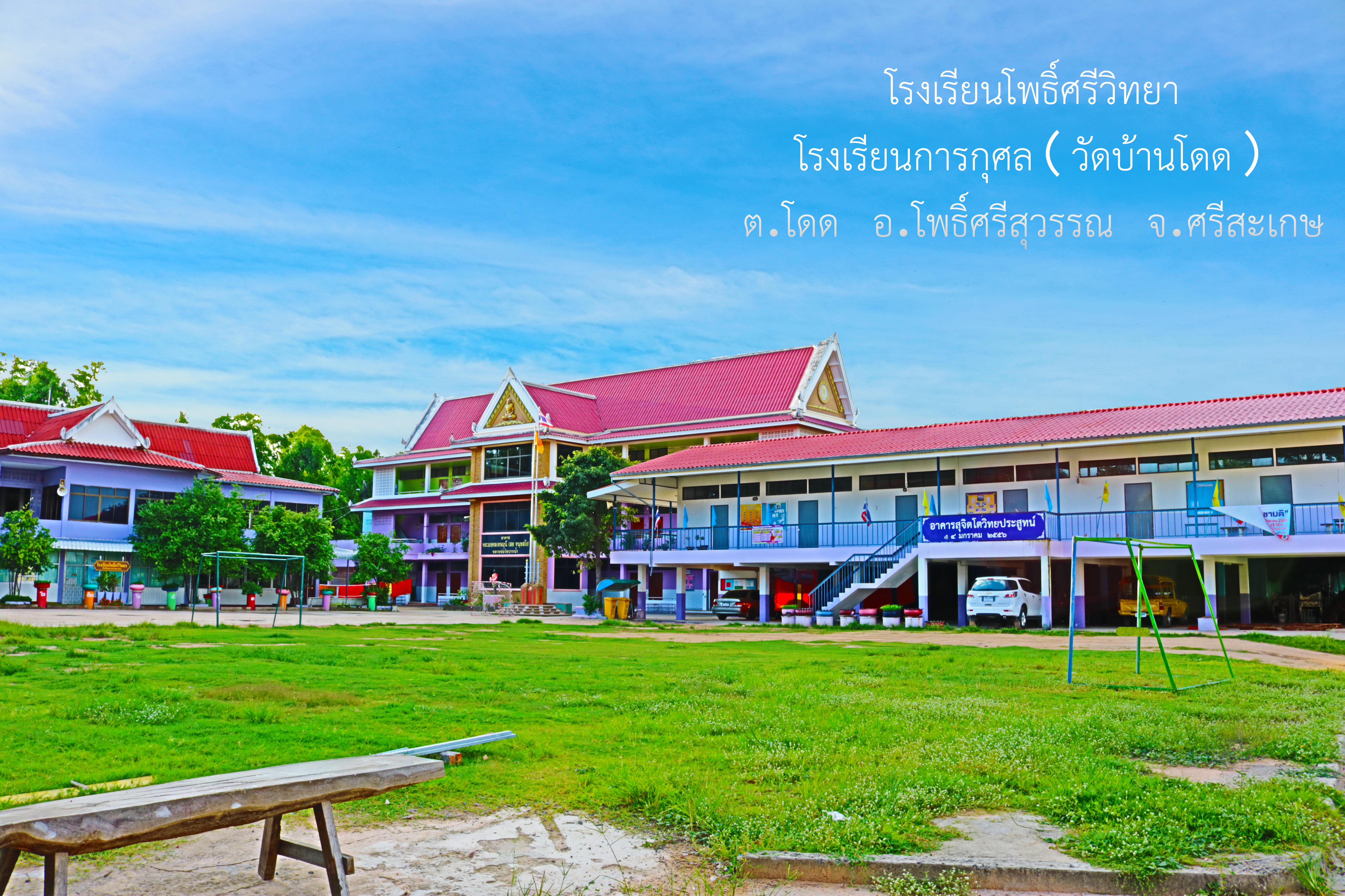 โรงเรียนวัดบ้านโดด